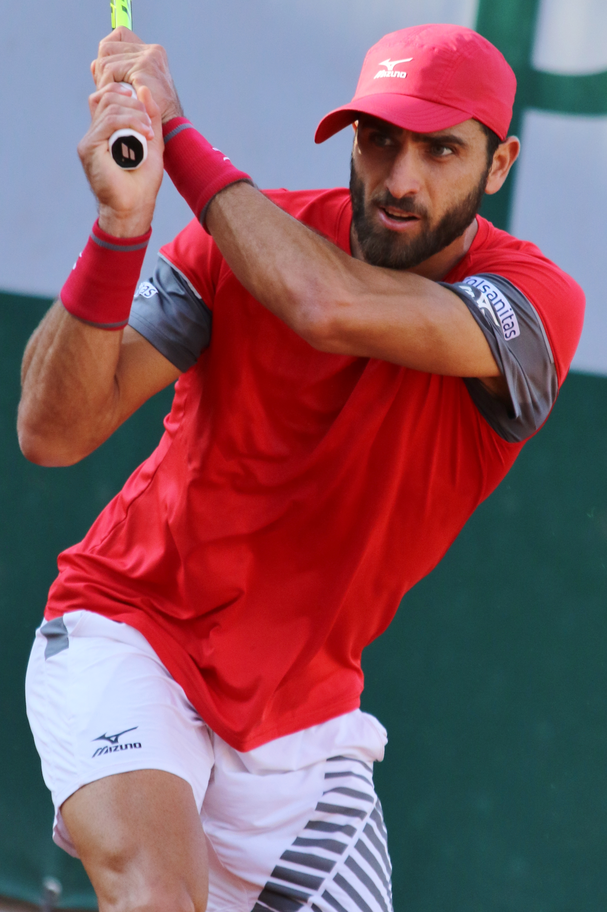 Farah RG18 (12)